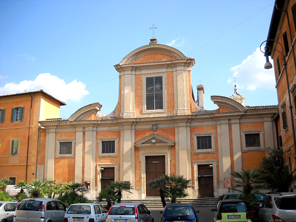 Chiesa di San Francesco a Ripa nel rione Trastevere di Roma.